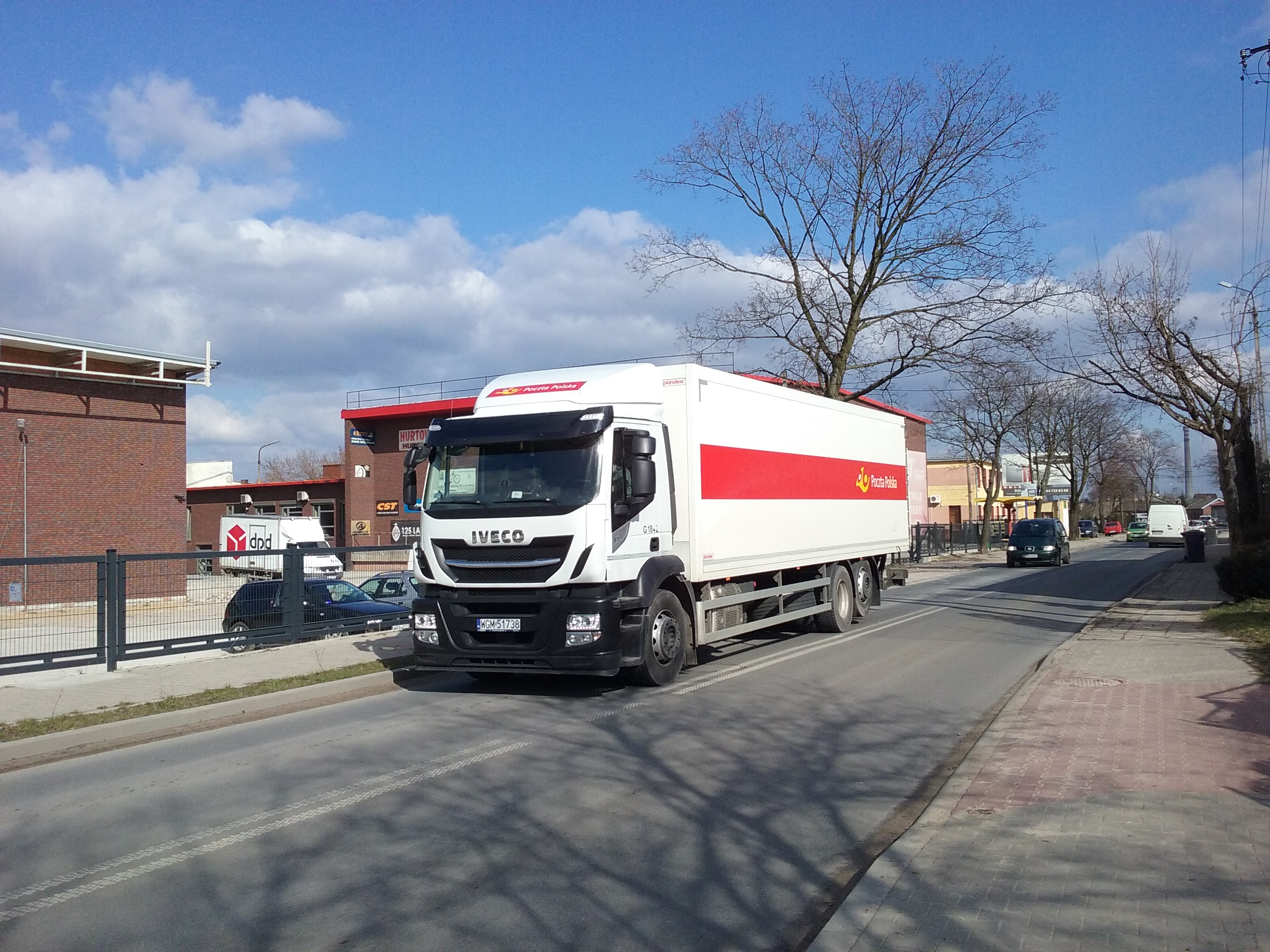 Tomaszów Mazowiecki w województwie łódzkim. Samochód pocztowy Iveco przeznaczony do przewozów dalekobieżnych. Ulica Główna w Tomaszowie, marzec 2018 rok